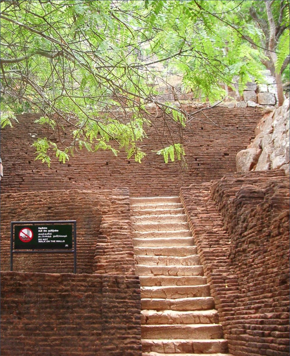 Escales d'ascens a Sigiriya, foto feta per J, Ollé el juliol del 2006